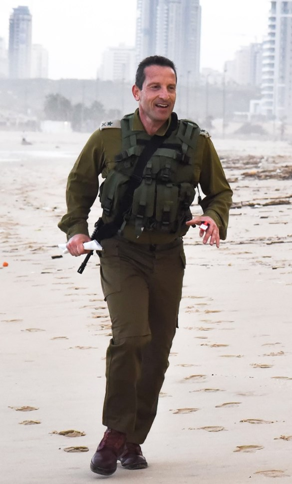 ברעם כמפקד המכללות הצבאיות והגיס הצפוני, מבצע בוחן כשירות קרבית עם הסגל והחניכים במכללות הצבאיות.